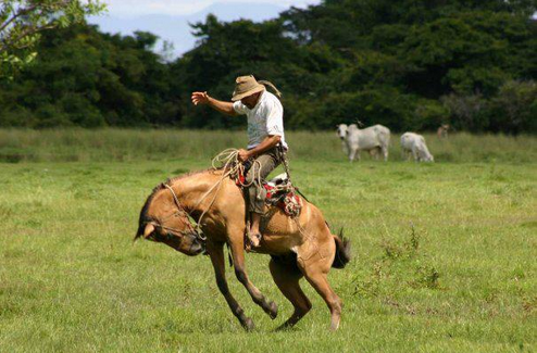 Llanero en Cabllalo